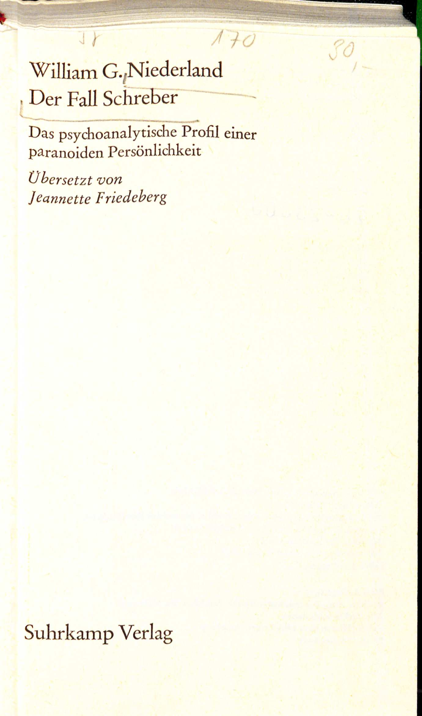 William G. Niederland Der Fall Schreber 1978 Titel